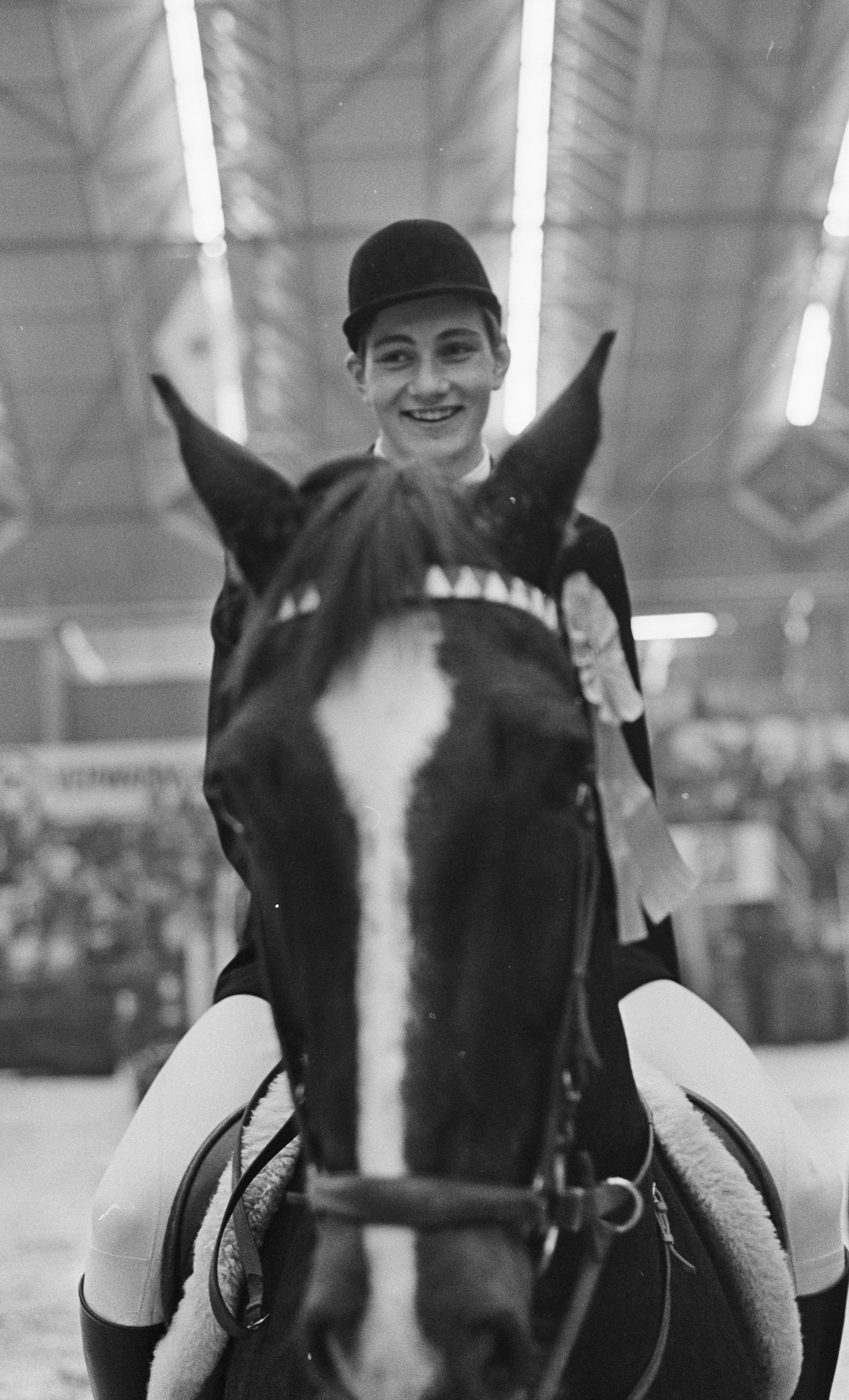 Juming Amsterdam in de RAI te Amsterdam. Winnaar van het nationaal springconcours, Eddy Stibbe op het paard Autumn Breeze